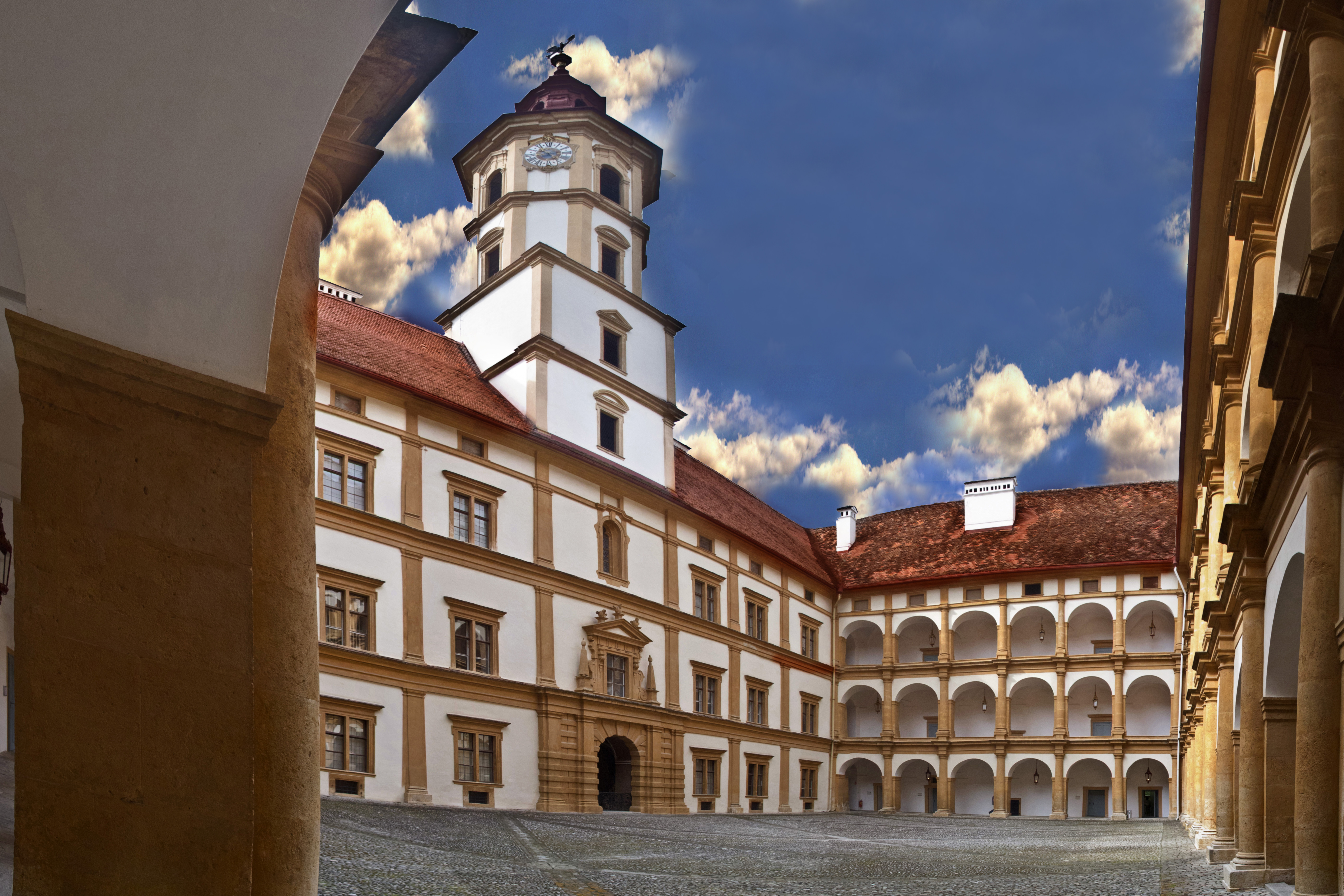 Schloß Eggenberg Innenhof